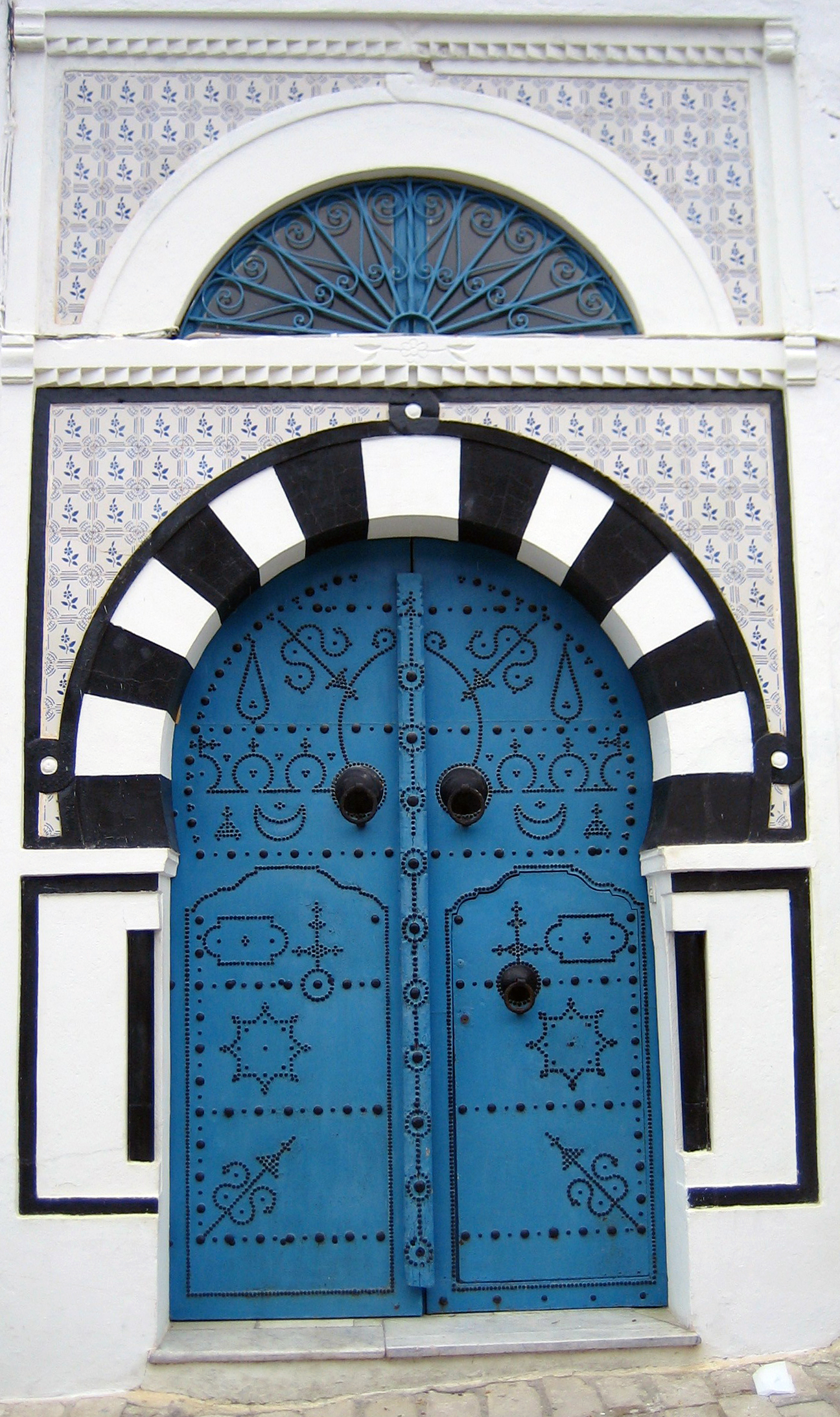 Tunisian Door